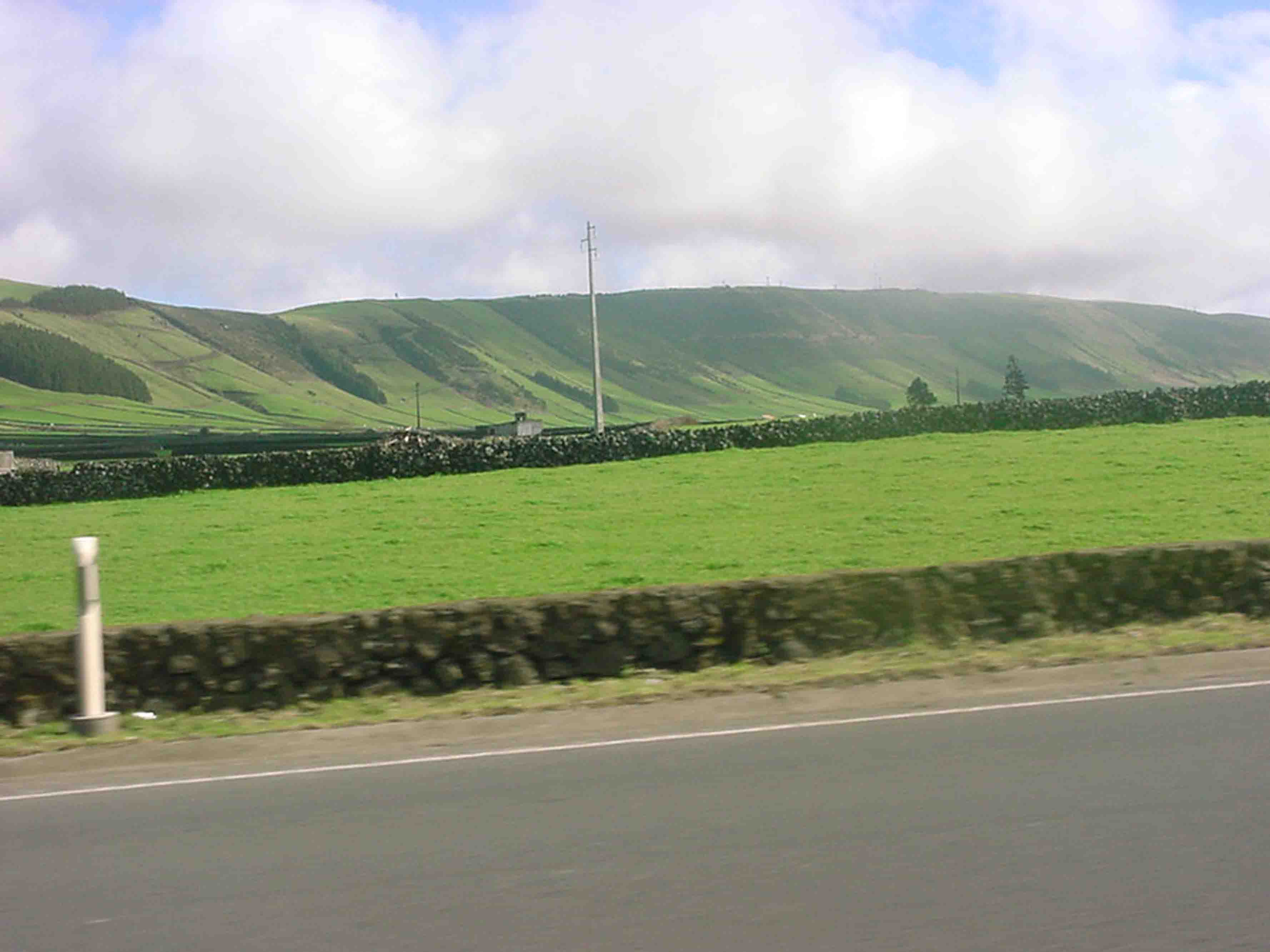 Serra do Cume, Praia da Vitória, ilha Terceira, Açores, Portugal.